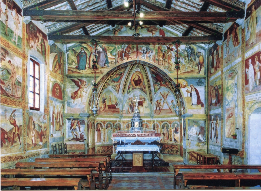 Chiesa di Sant'Andrea - Griis di Bicinicco Veduta dell'interno affrescato Opera di Arsenio Negro (attribuzione)